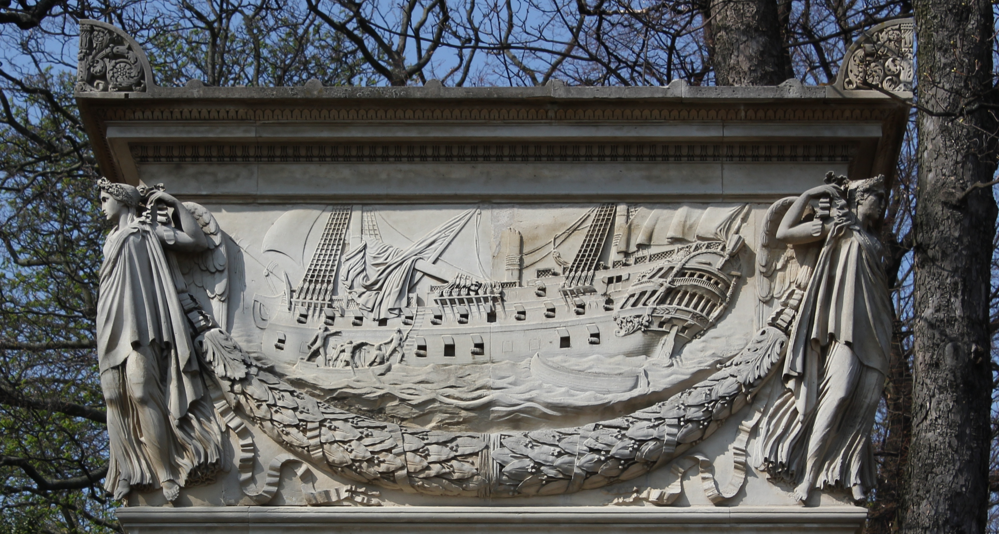 Sépulture de Denis Decrès (1761-1820), ministre de la Marine. Monument rectangulaire surmonté d'un cénotaphe décoré de guirlandes de lauriers et de génies ailés. Les quatre faces sont décorées de bas-reliefs. Face antérieure : blason et le sabre d'honneur. Face postérieure : ancre entourée d'un triton. Le bas-relief de la partie latérale de gauche représente le vaisseau Guillaume Tell lors du blocus de Malte le 30 mars 1800. Le bas-relief de la partie latérale de droite représente le vaisseau Glorieux le 12 avril 1782.détail. "In 1780 Decres served on the Richmond, of the squadron of de Grasse. He took part in all the the combats which this fleet had to sustain. This plaque commemorates that "in the action of 12 April 1782 (at the Battle of the Saintes), he went in a boat under fire of the English Fleet, to tow the ship Glorieux whose masts had fallen, out of the danger in which it was placed. He was as a result rewarded with the rank of Naval Ensign." A career defining moment. [1]